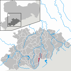 Bärenstein im Erzgebirgskreis, Sachsen